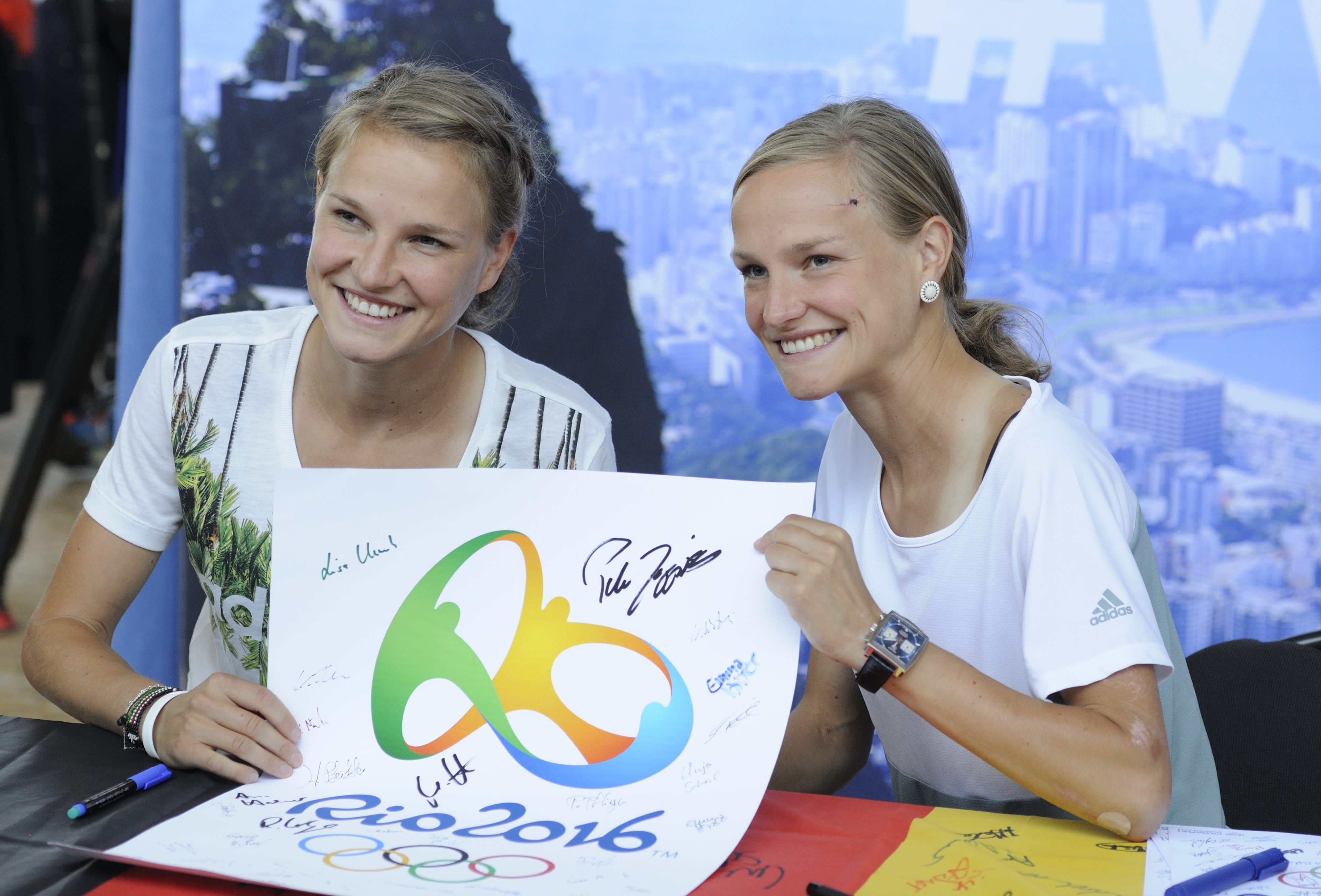 Bild aufgenommen in Hannover während der Einkleidung der deutschen Olympiamannschaft 2016. Anna und Lisa Hahner.